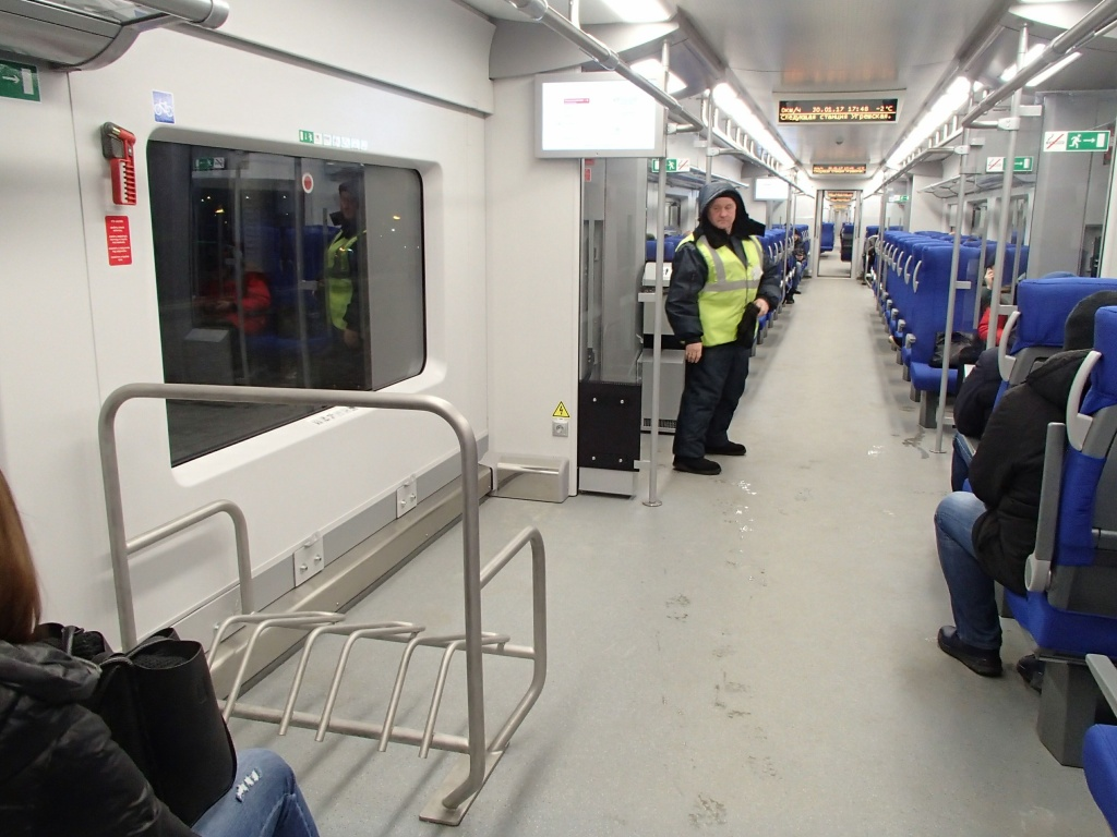 Салон электропоезда ЭС2Г нового выпуска. Зона для велосипедов